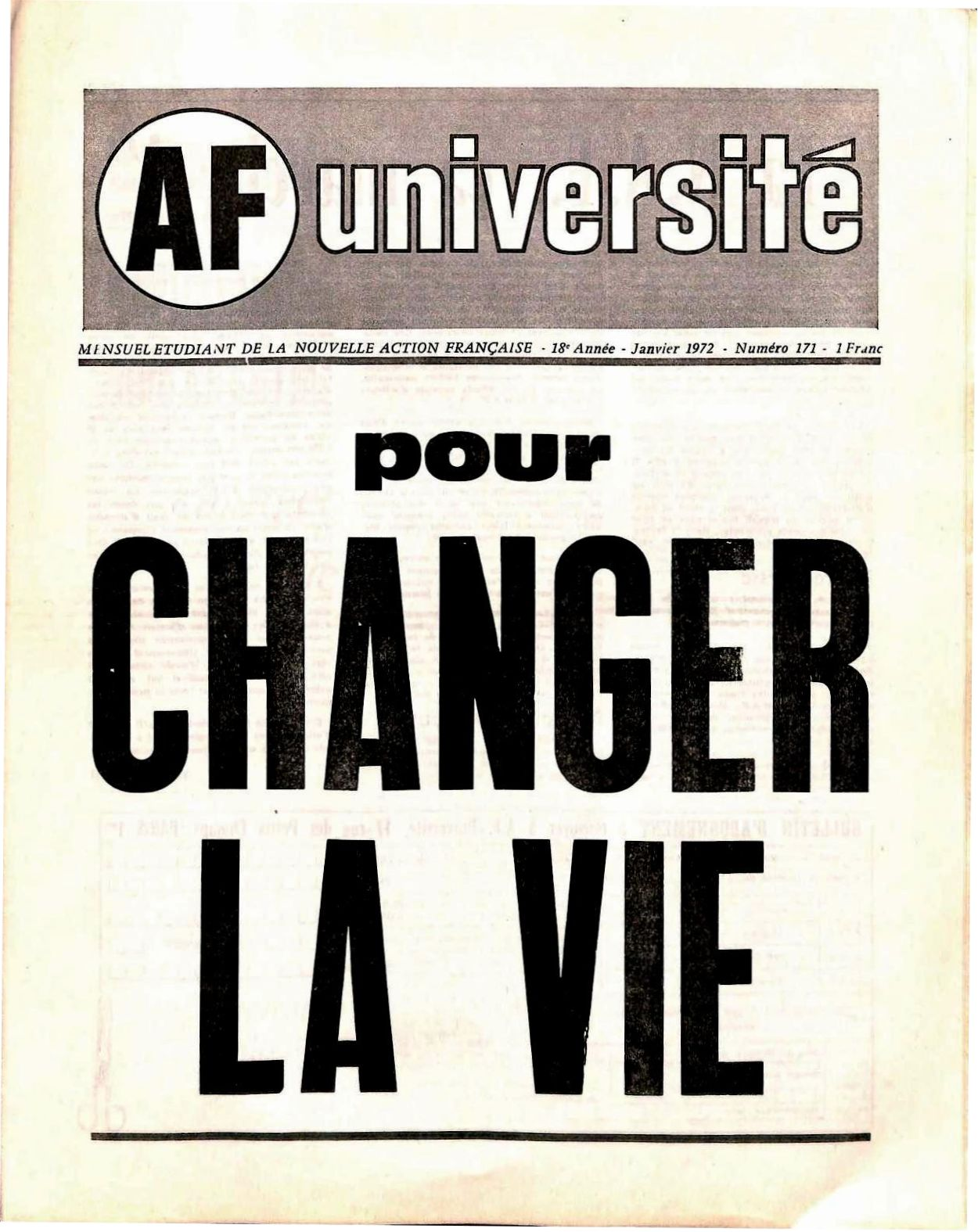 Couverture de AFU 171 en janvier 1972